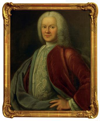 Nils Rosén von Rosenstein, "Barnläkekonstens fader".